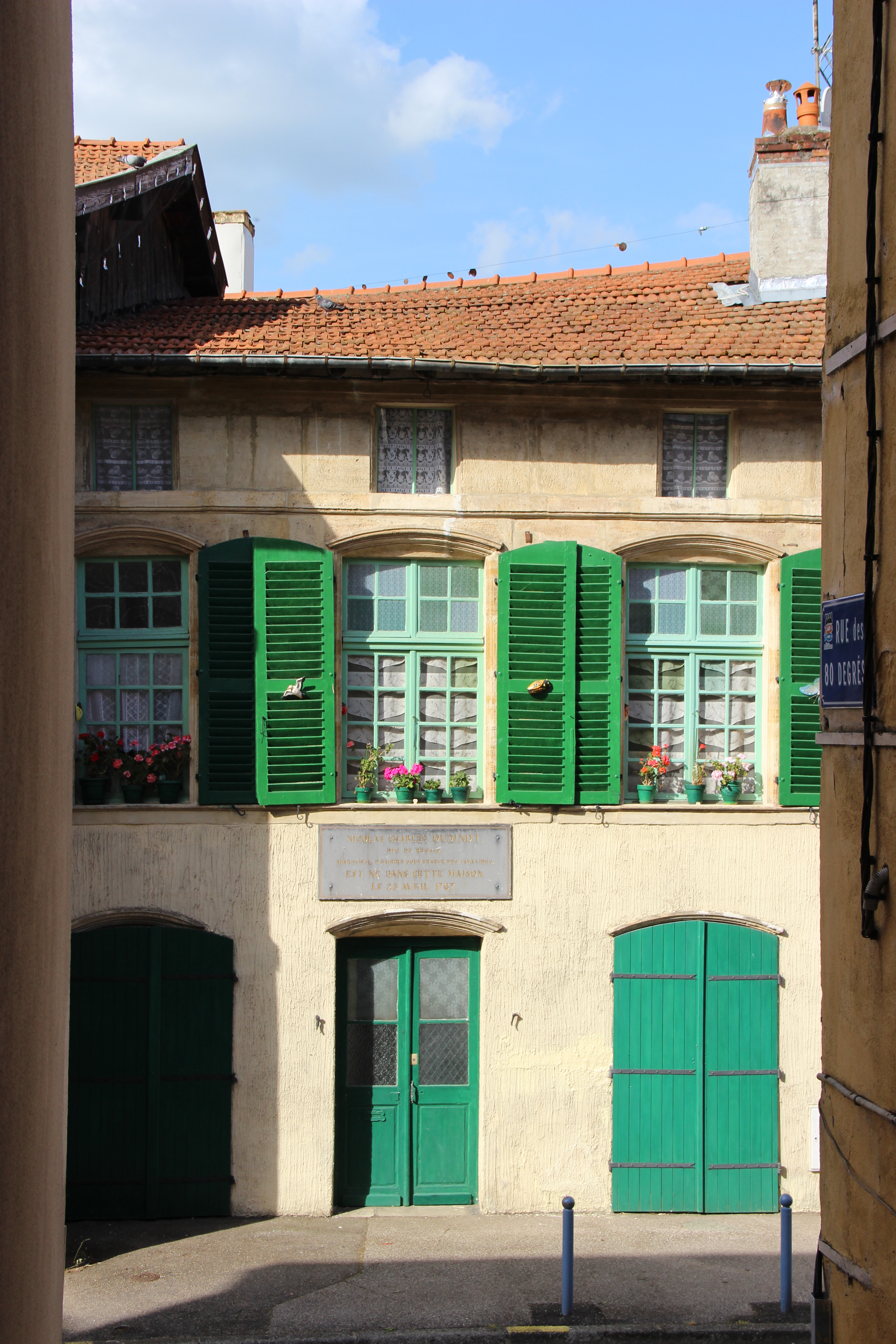 Maison natale du Maréchal Oudinot dans la rue éponyme.